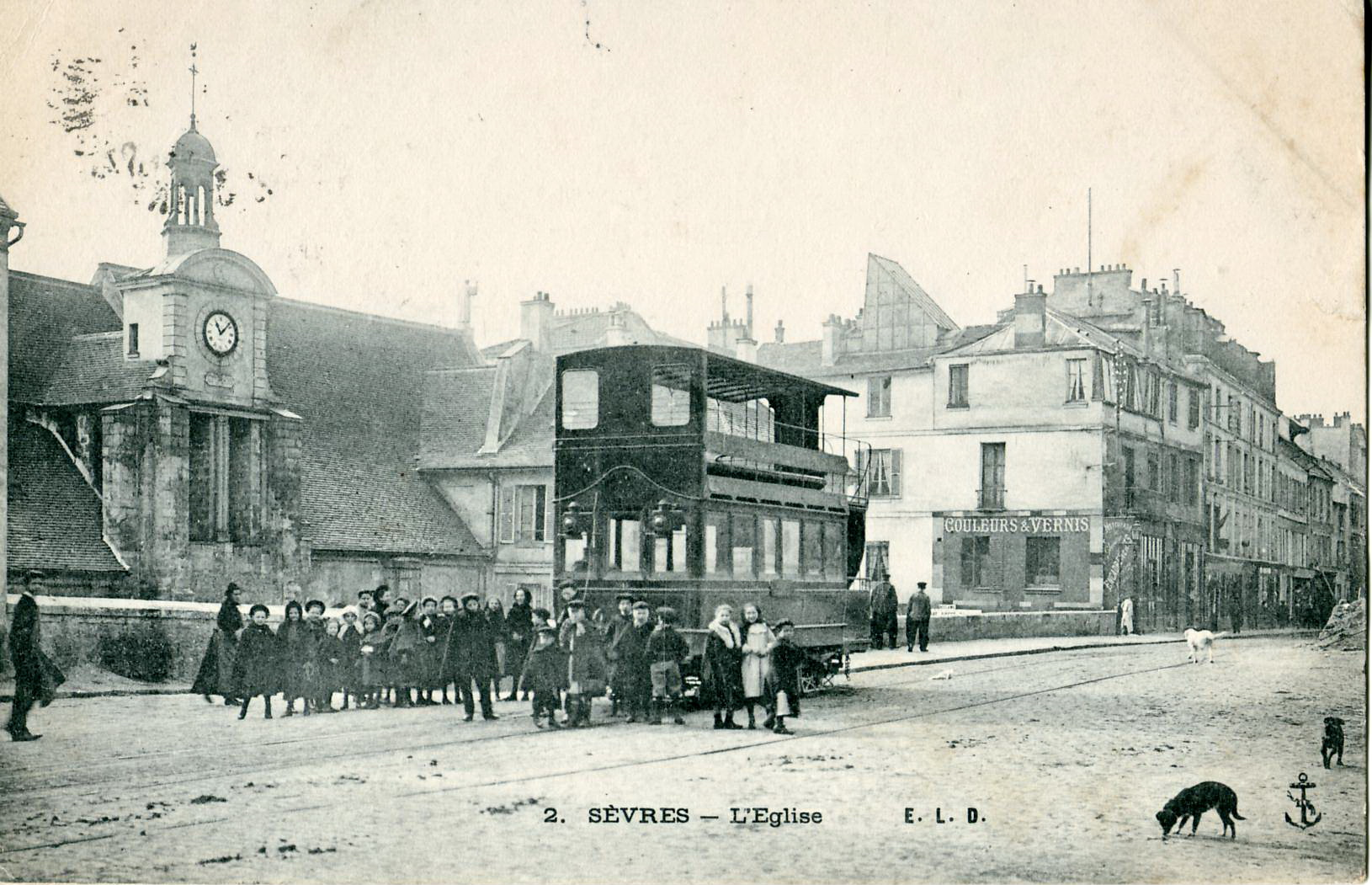 Carte postale ancienne éditée par ELD, N°2Sèvres (Hauts-de-Seine - Île-de-France - France) : l'Eglise